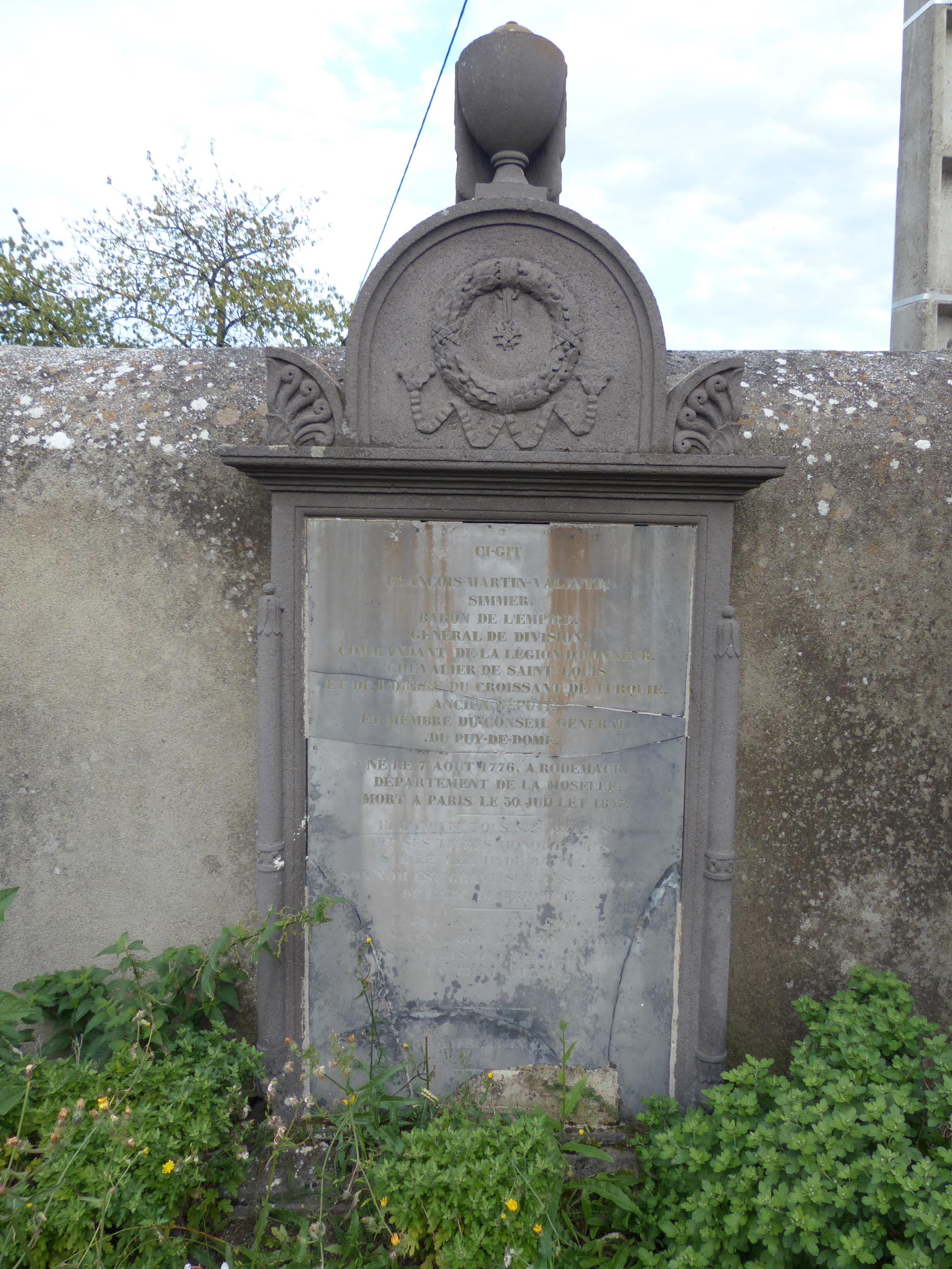 Varennes-sur-Morge (Puy-de-Dôme). Cimetière. Tombe du général baron François Martin Valentin Simmer.